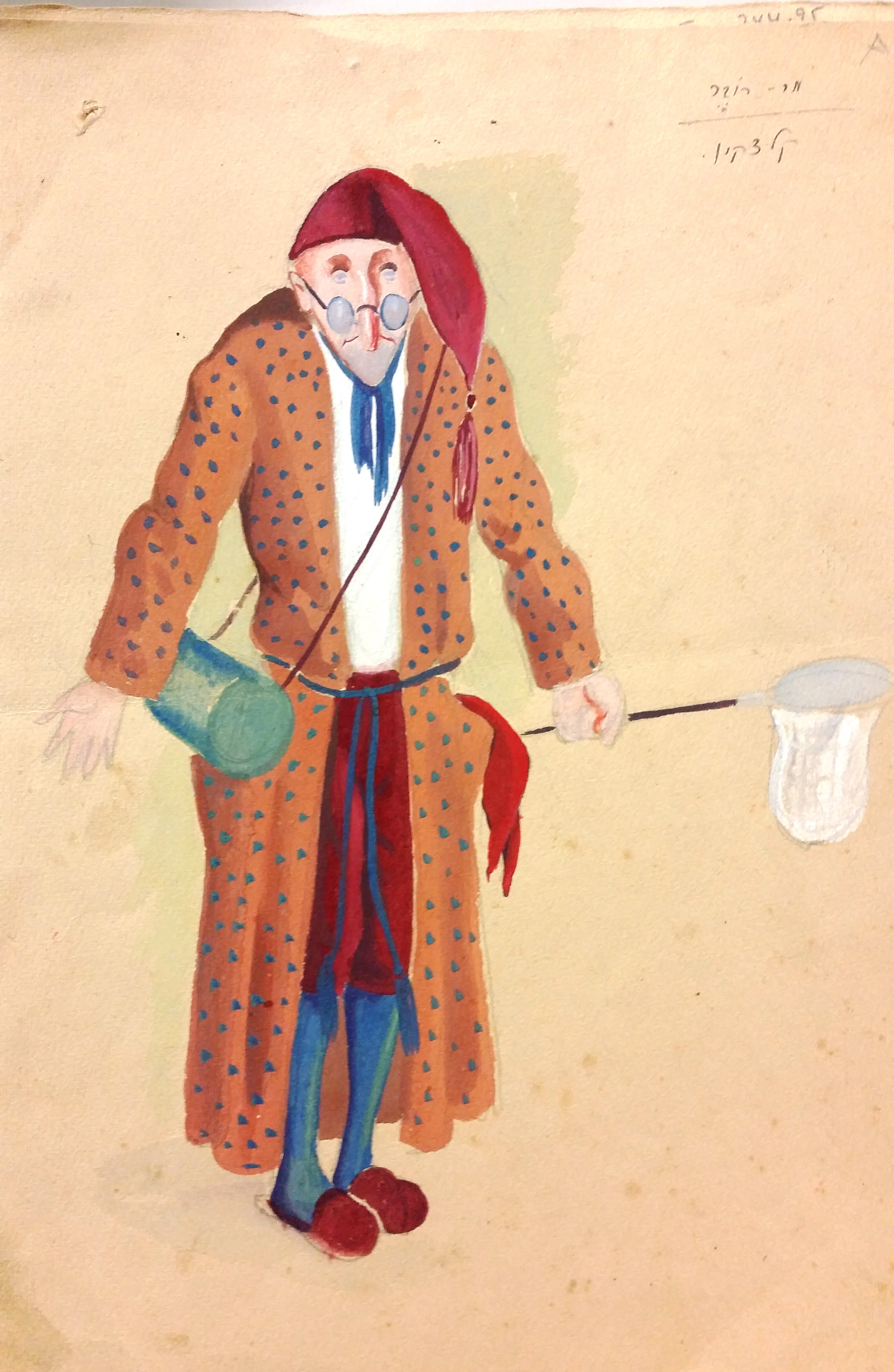 סקיצה לשחקן רפאל קלצ'קין בתפקידו בהצגה "הרופא בעל כורחו"